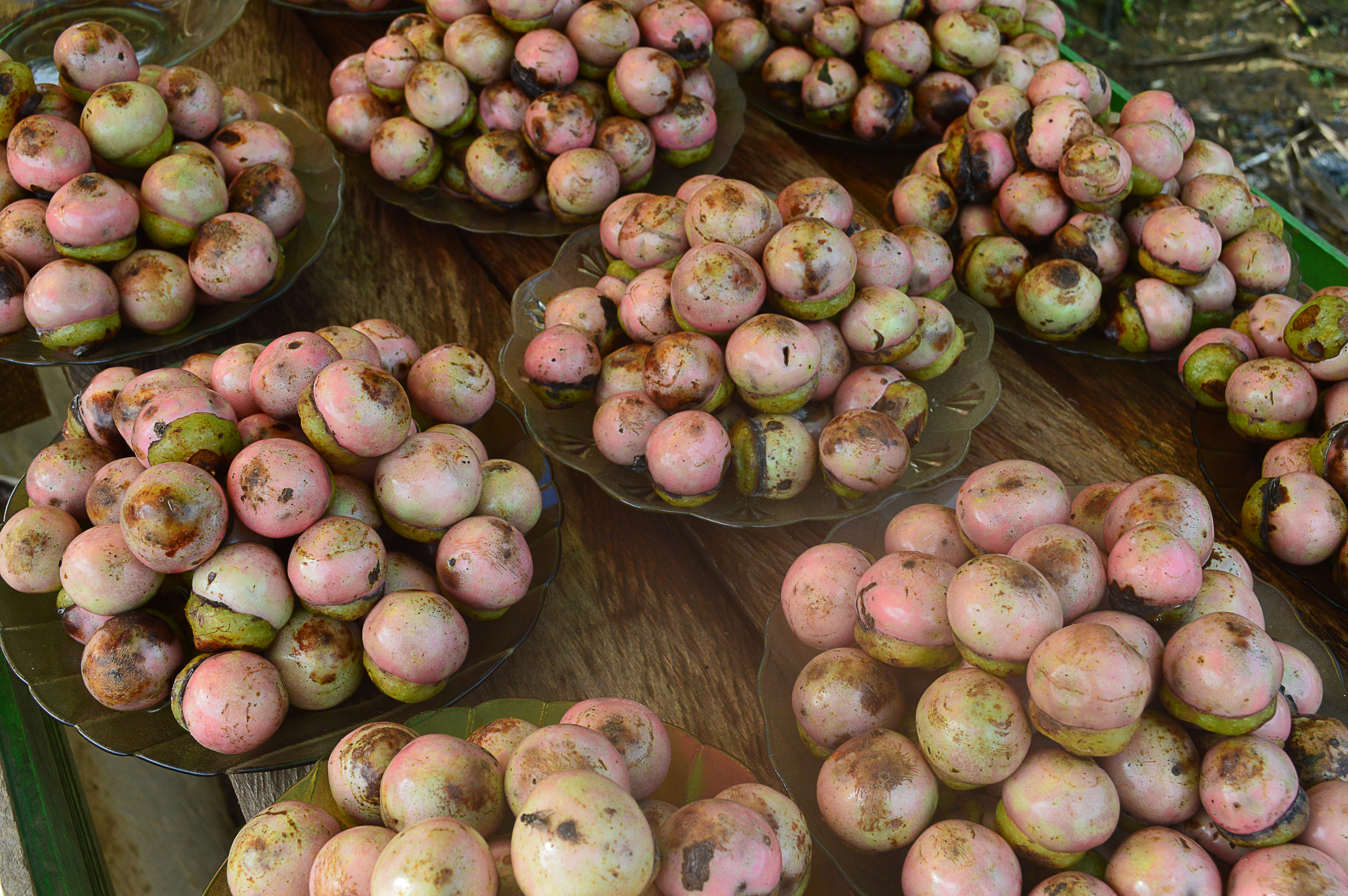 Kalangkala, buah khas Kalimantan.